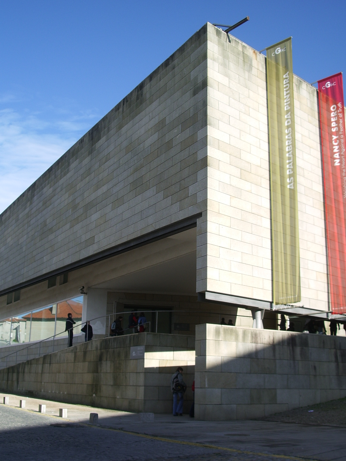 Deskribapena Centro Galego de Arte Contemporaneo, Santiago de Compostela, arkitektoa: Alvaro Siza Vieira Iturburua nik neuk hartua Sortze Data 2004-11-07 Argazkilaria josugoni Aldaketak ez